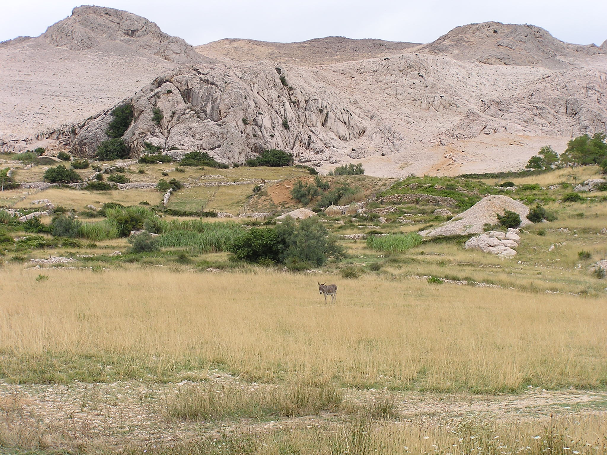 Island Pag